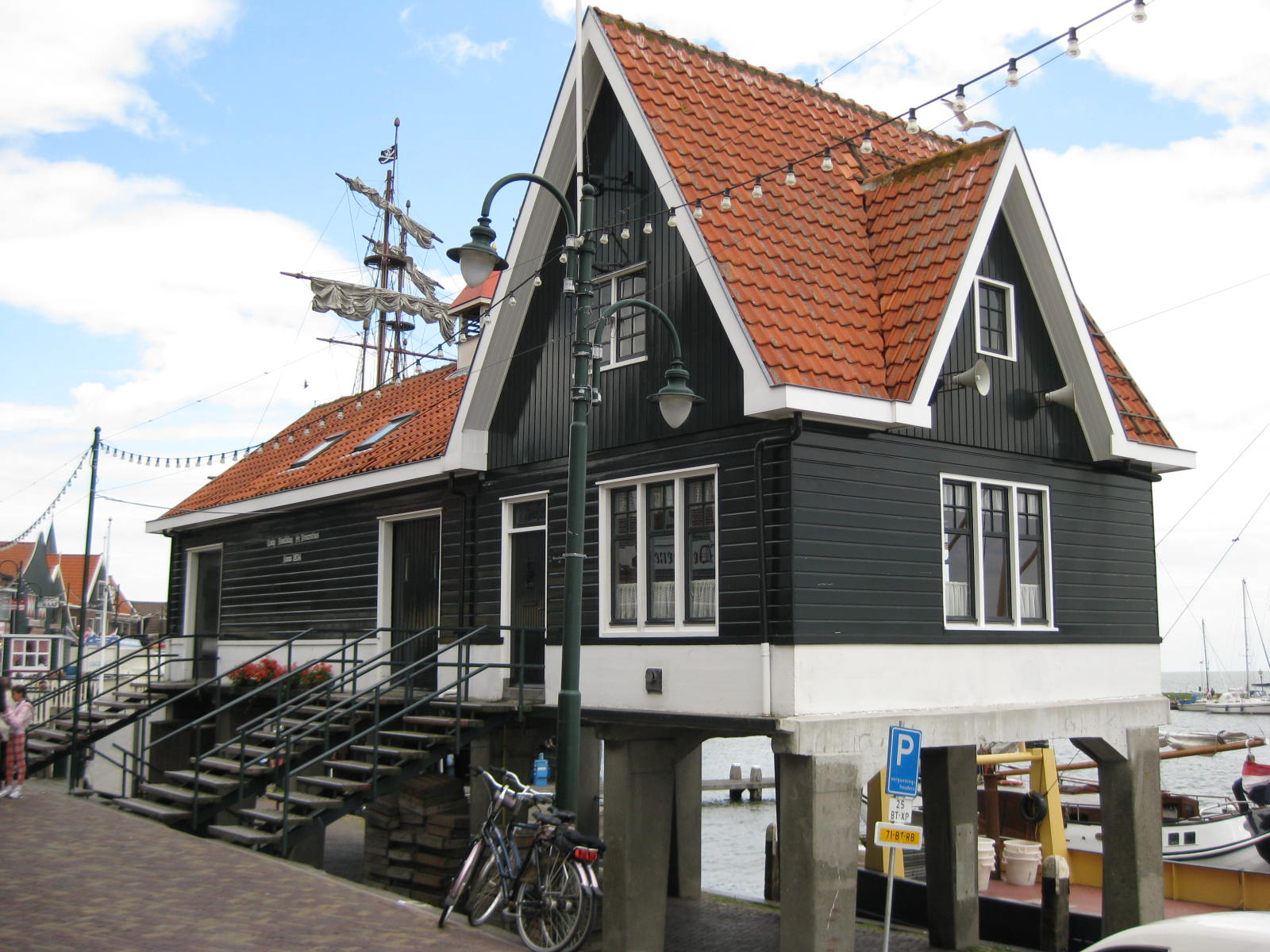 Coop. Visafslag St. Vincentius in Volendam, Nederland